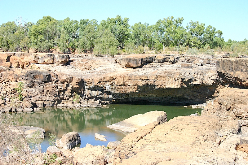 Leichhardt Falls